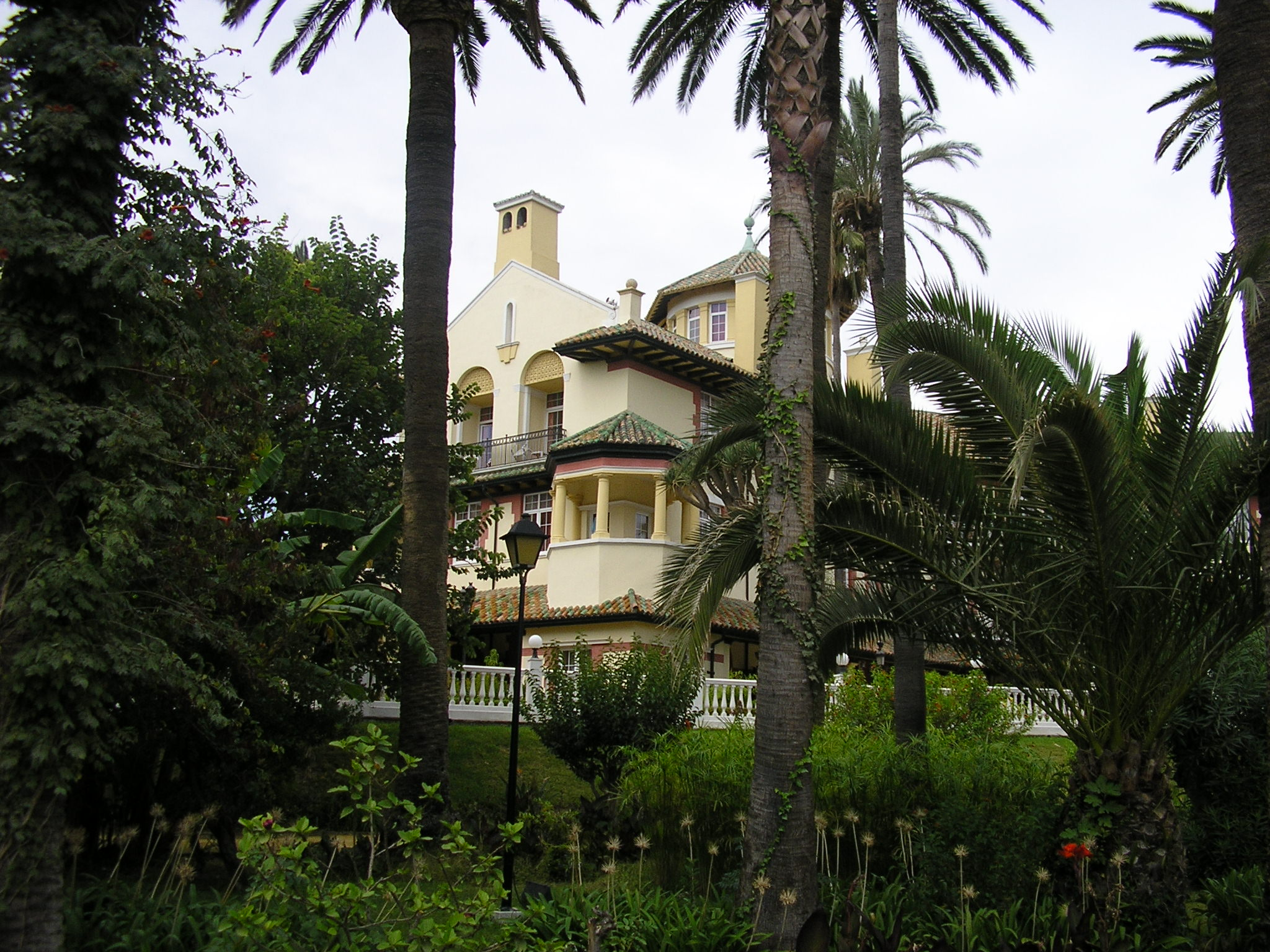 Hotel reina Cristina de Algeciras, Andalucía, España.